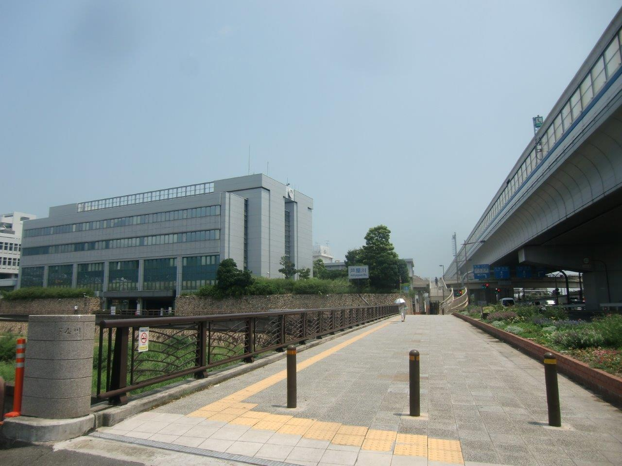 国道43号線より西側から撮影 川向こうに芦屋市役所を望む